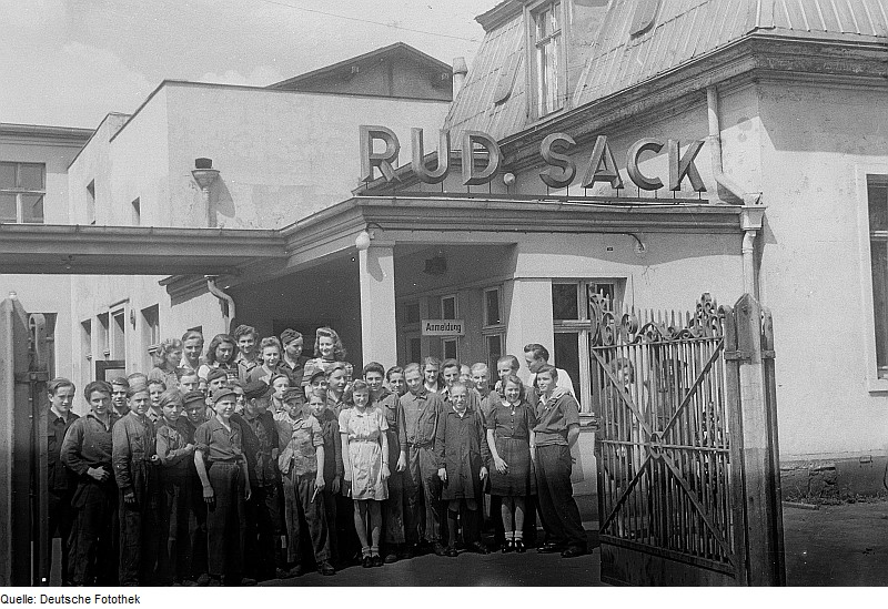 Original image description from the Deutsche Fotothek Gruppenportrait von Jugendlichen am Tor der Firma Rudolph Sack